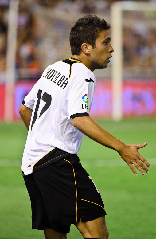 El jugador merengot Jordi Alba